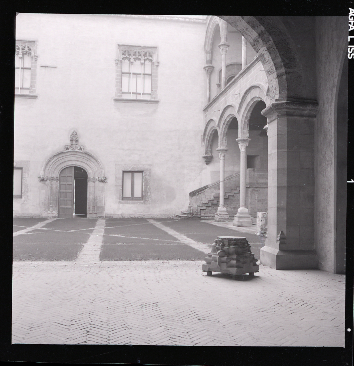 Palermo. Galleria Regionale della Sicilia, Museo Regionale Abatellis. Esterni. Cortile interno: vista verso sud est. Servizio fotografico : Palermo, 1961 / Paolo Monti. - Buste: 1, Fototipi: 1 : Negativo b/n, gelatina bromuro d'argento/ pellicola ; 6x6. - ((Serie costituita da 1 busta di negativo identificato con il n.: 23809. - . Sulla busta iscrizione manoscritta: "Arch. Scarpa/ Palermo". - La suddetta serie è contenuta nella scatola R23977-24178 e identificata con l'iscrizione didascalica manoscritta a pennarello nero. "Architetti/ musei e varie". - (s.d.)